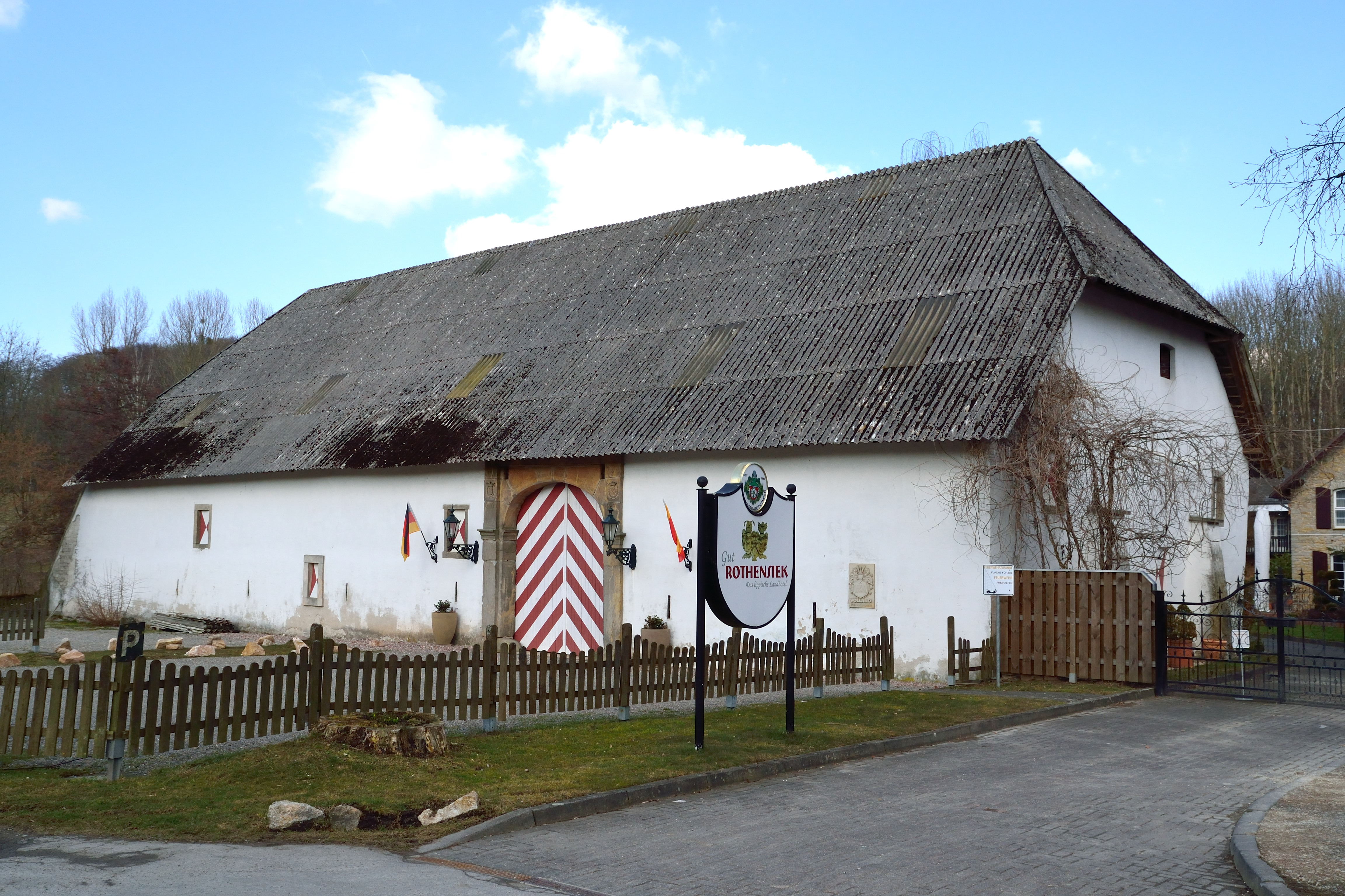 This is a photograph of an architectural monument. .1 Torhaus "Gut Rothensiek"